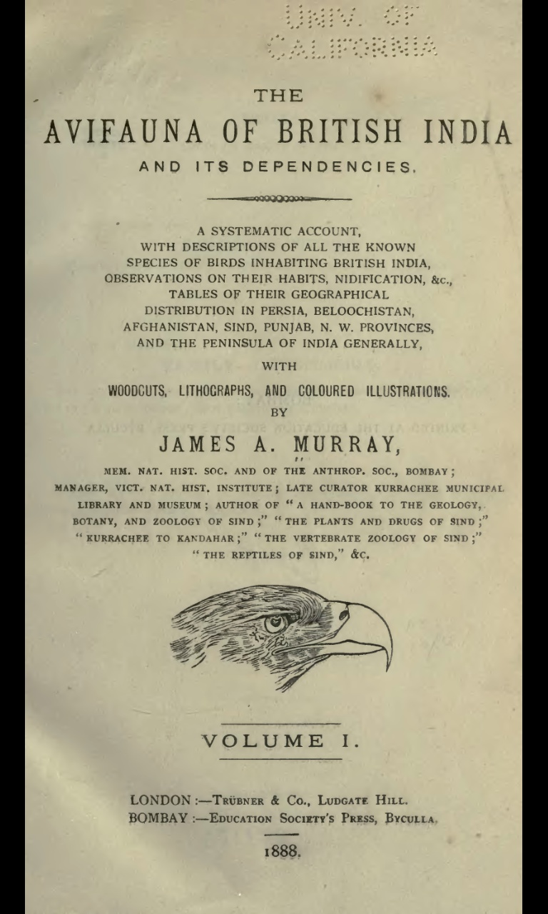 Front page